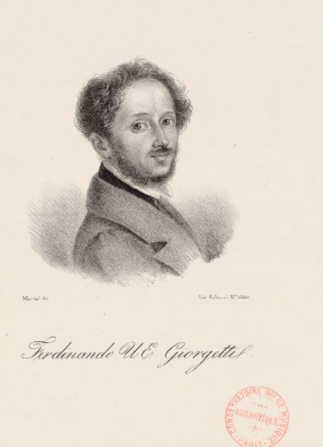 Ferdinando Giorgetti (1796-1867) , estampe Ferdinando Giorgetti / Martini Éditeur : Salucci 1830 lithogr. ; 9 x 9 cm BNF/Gallica Identifiant : ark:/12148/btv1b8420317x